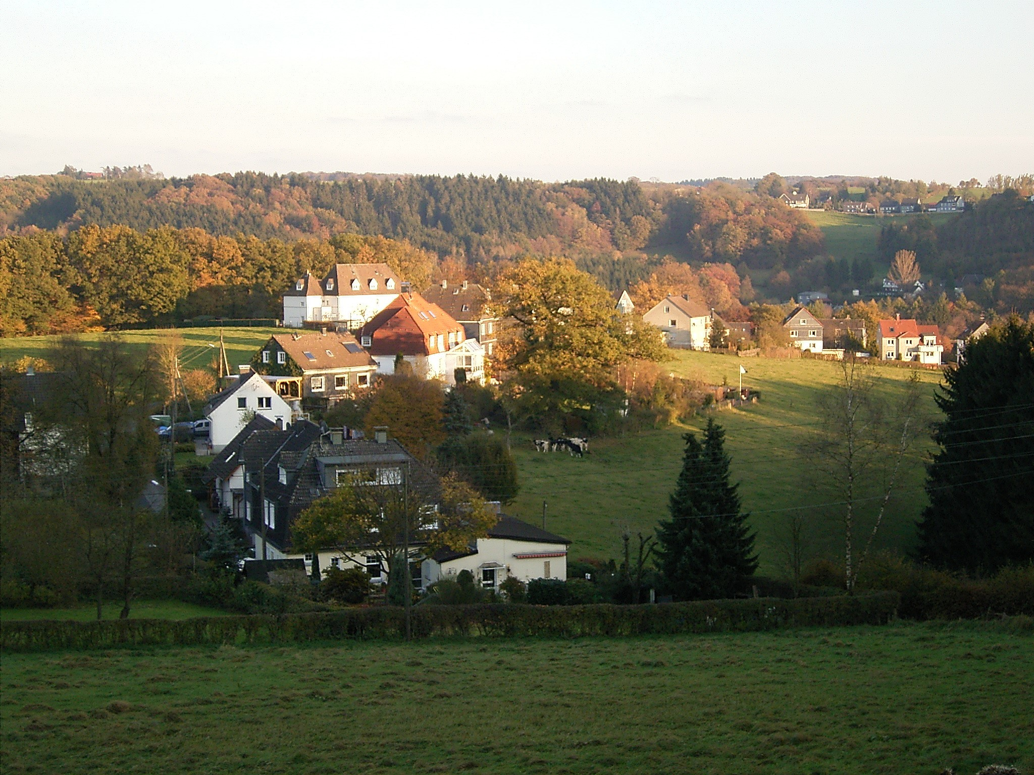 Radevormwald